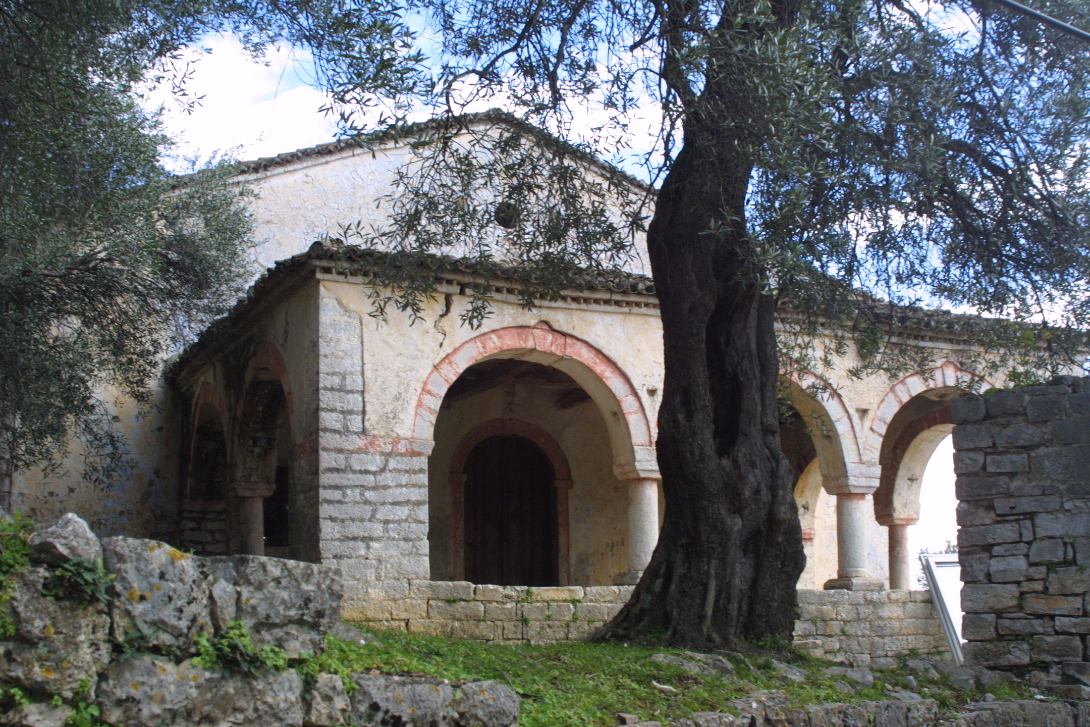 Kisha e Shen Spiridhonit